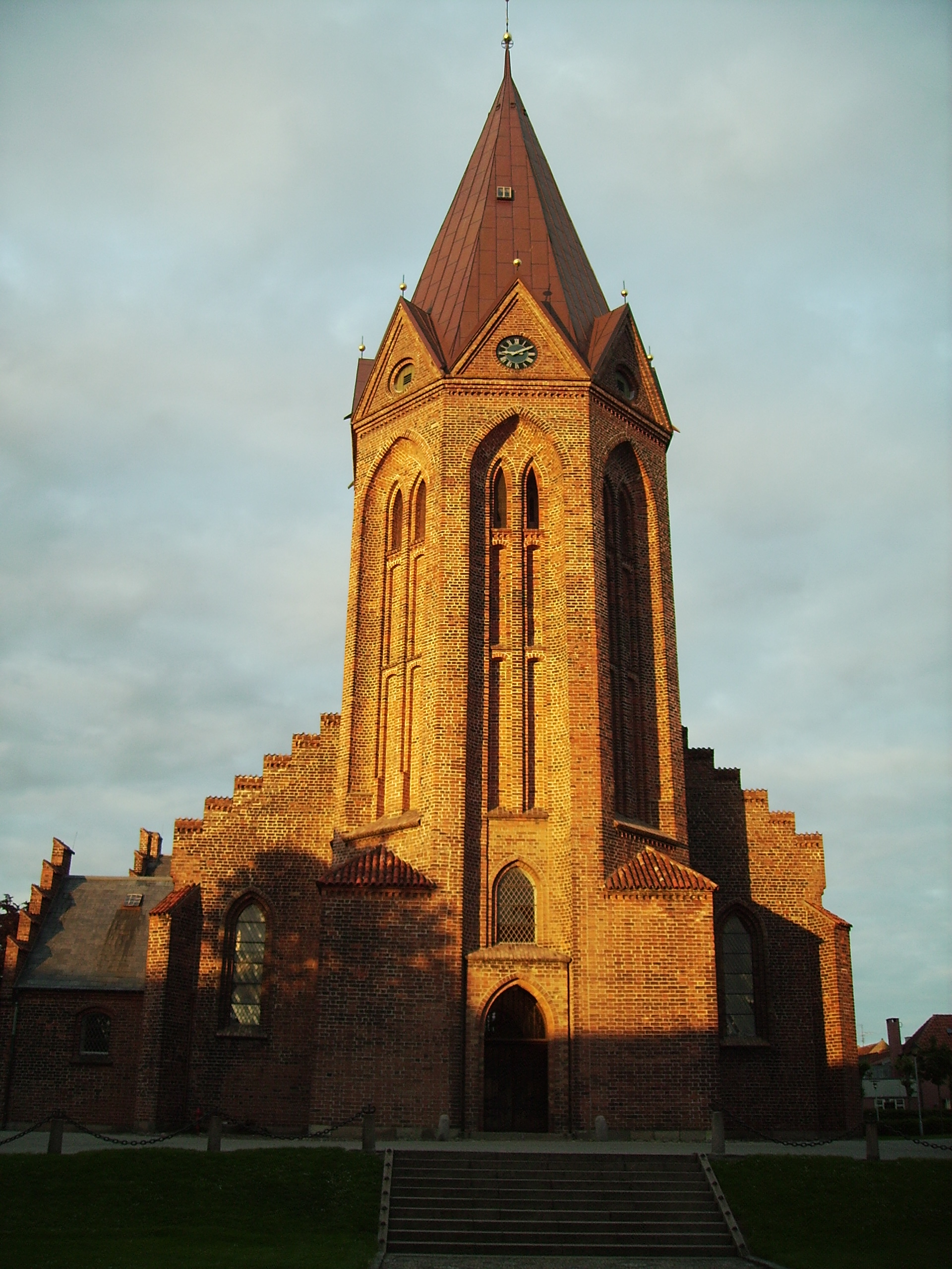 Vor Frue Kirke, Assens Sogn, Båg Herred, Odense Amt, Denmark (Danish Church) - Vor Frue Kirke fra vest i aftenlys